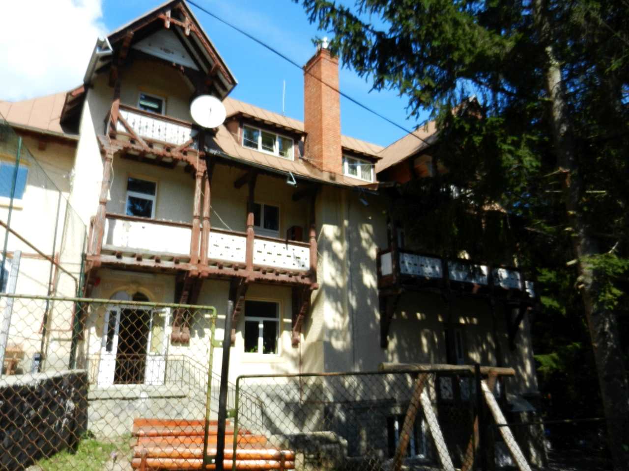 Vila Elena Mironescu, azi Casa de copii Sinaia